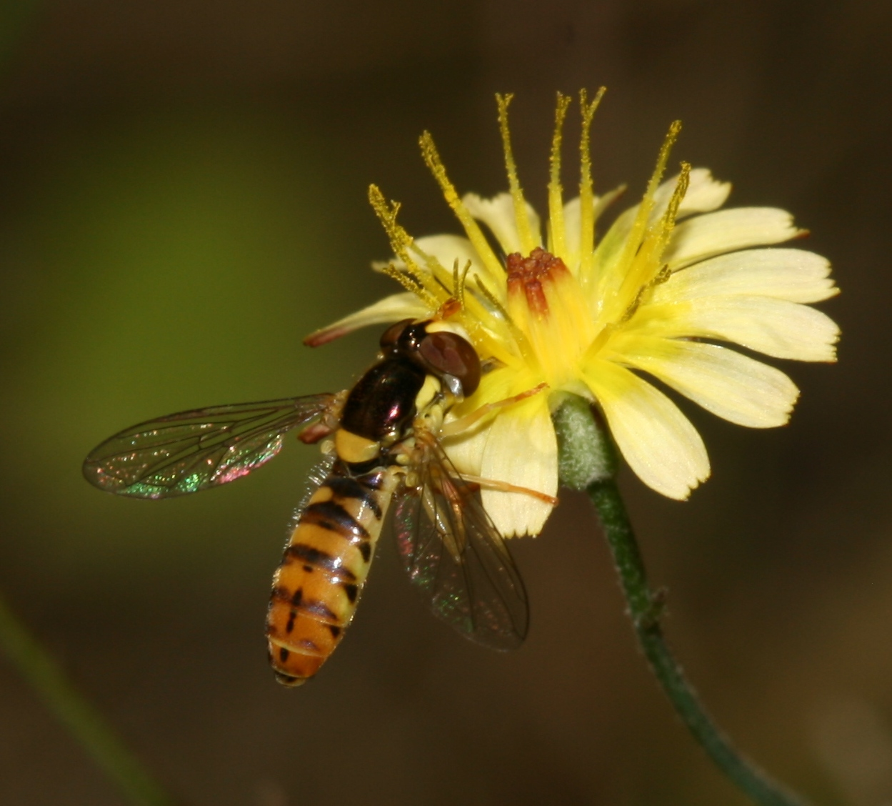 Argaka, Cyprus